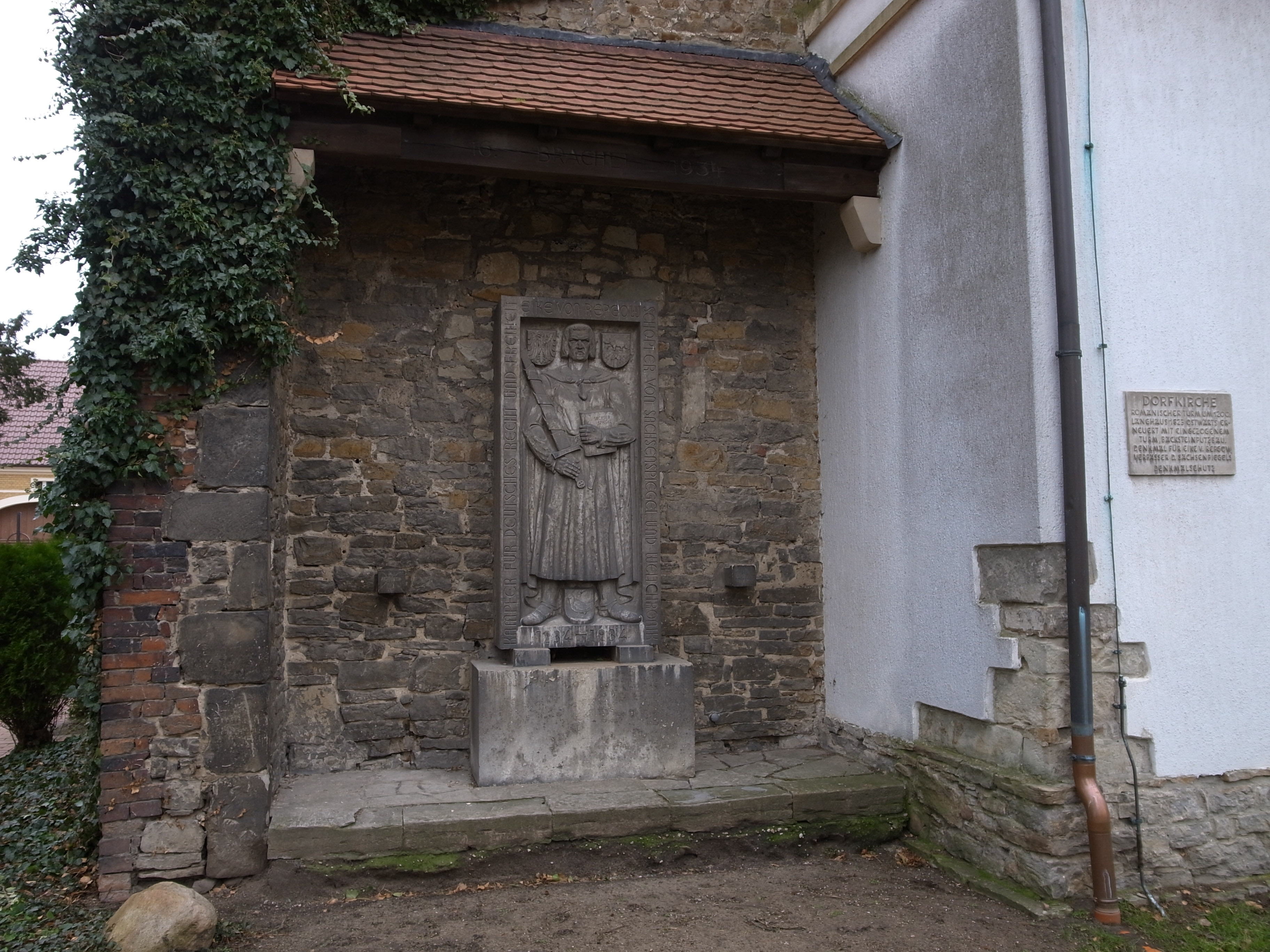 Eike von Repgow Denkmal an der Kirche von Reppichau